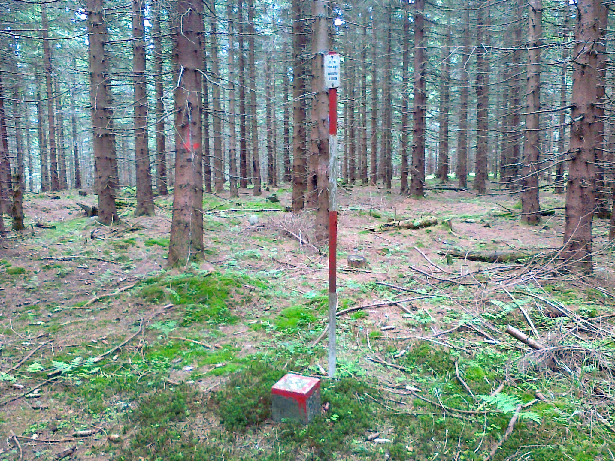 Punkt geodezyjny na szczycie góry Osikový vrch